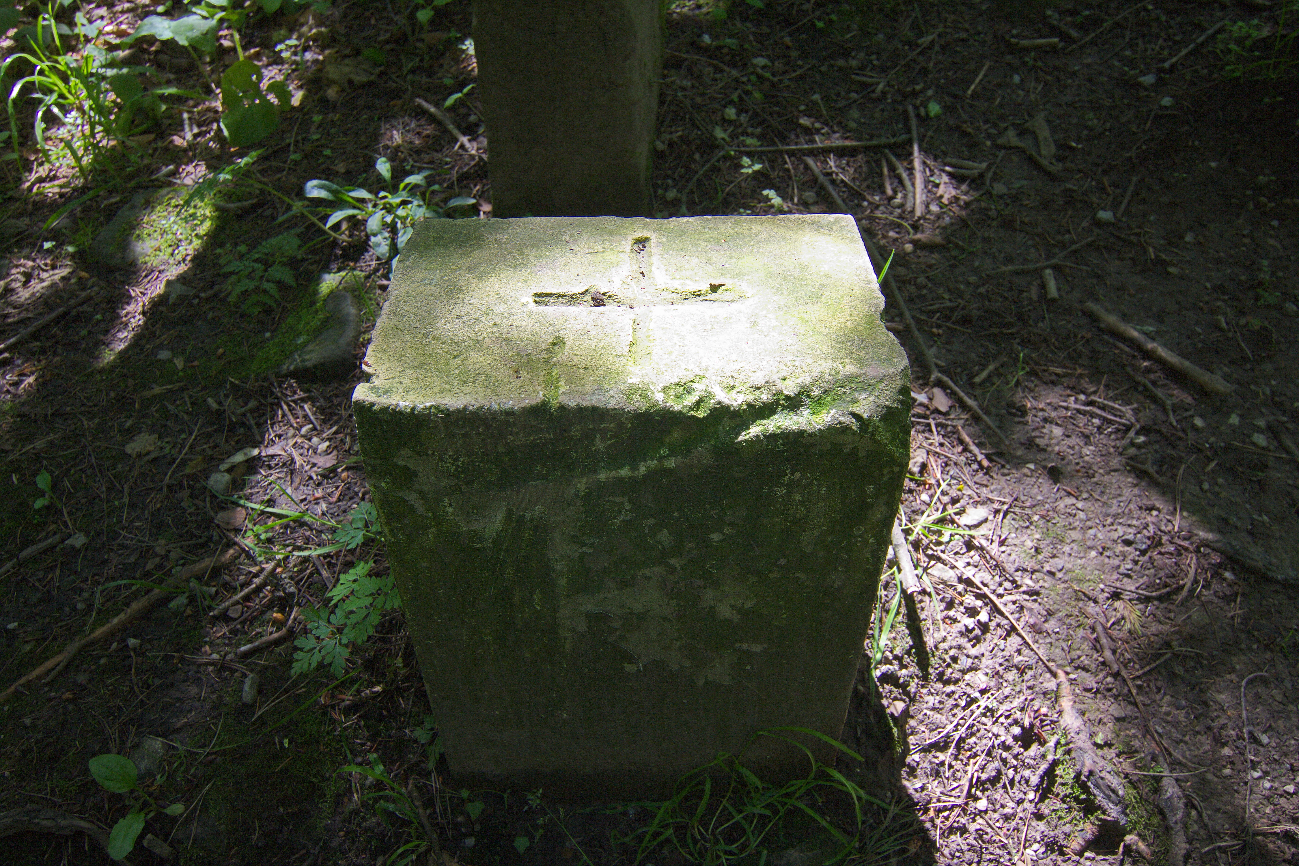 Landschaftsschutzgebiet Süntel, Niedersachsen, Deutschland